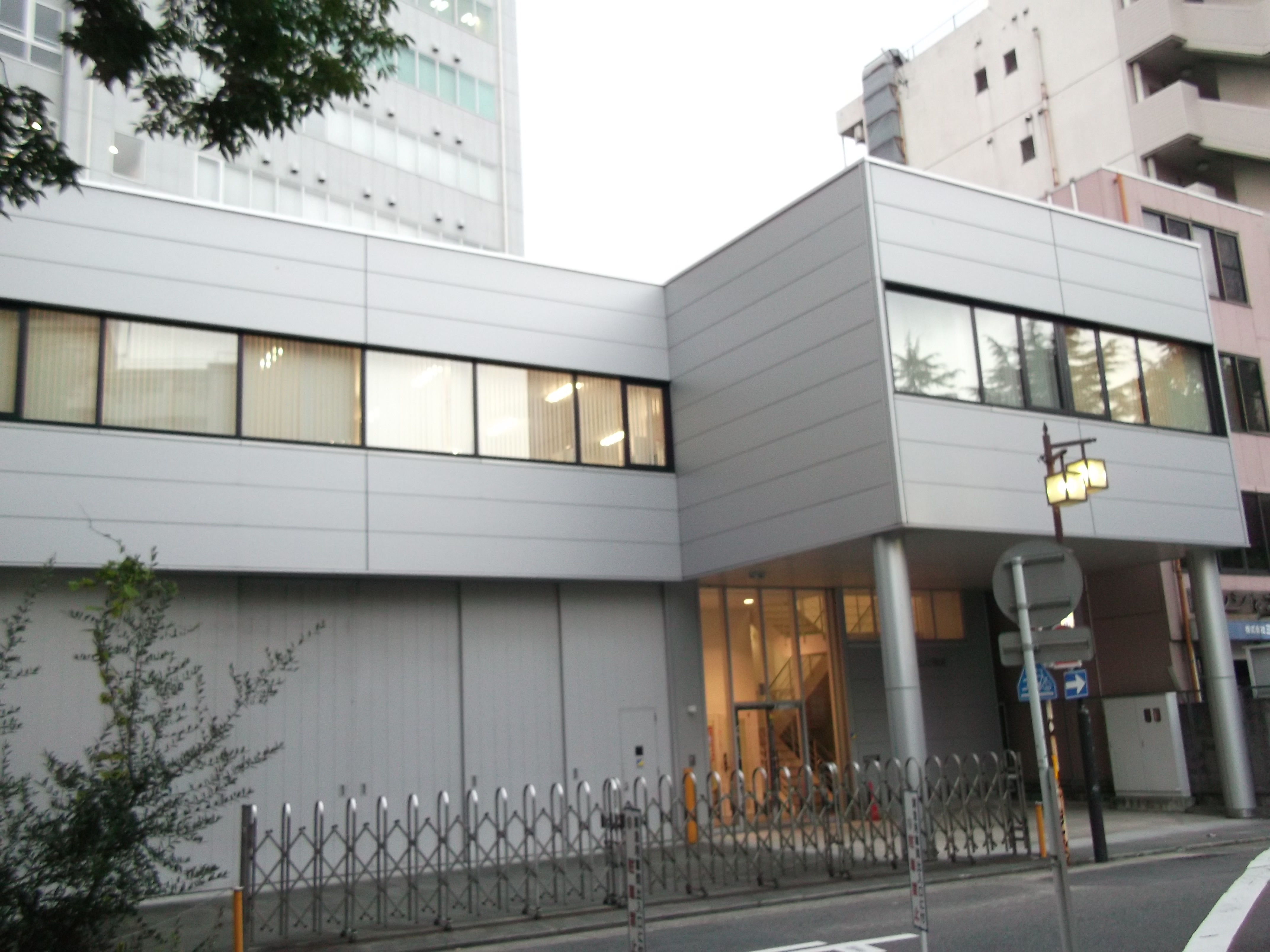 名古屋市東区東桜の東海テレビ事業本社を北側公道東側より撮影